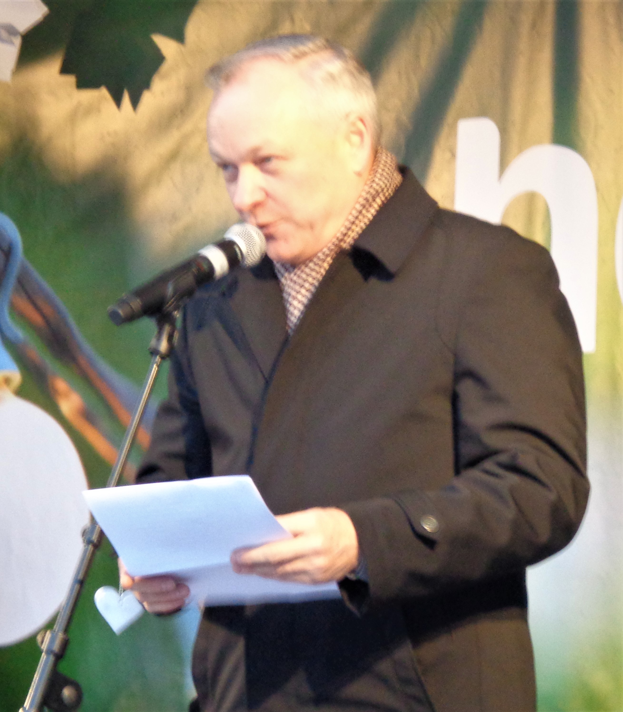 Kokoomuksen kansanedustaja Kalle Jokinen Hennan rautatieaseman avajaisissa joulukuussa 2017.